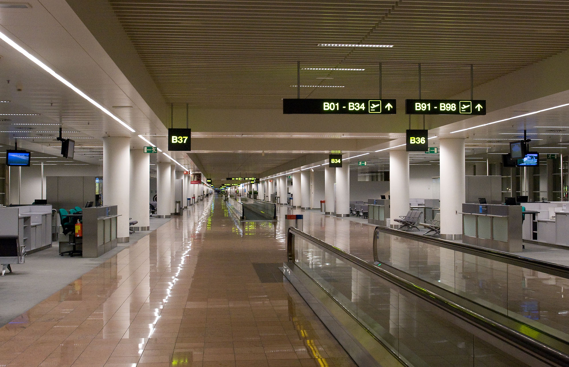 Zaventem Airport interior / Brussels, Belgium